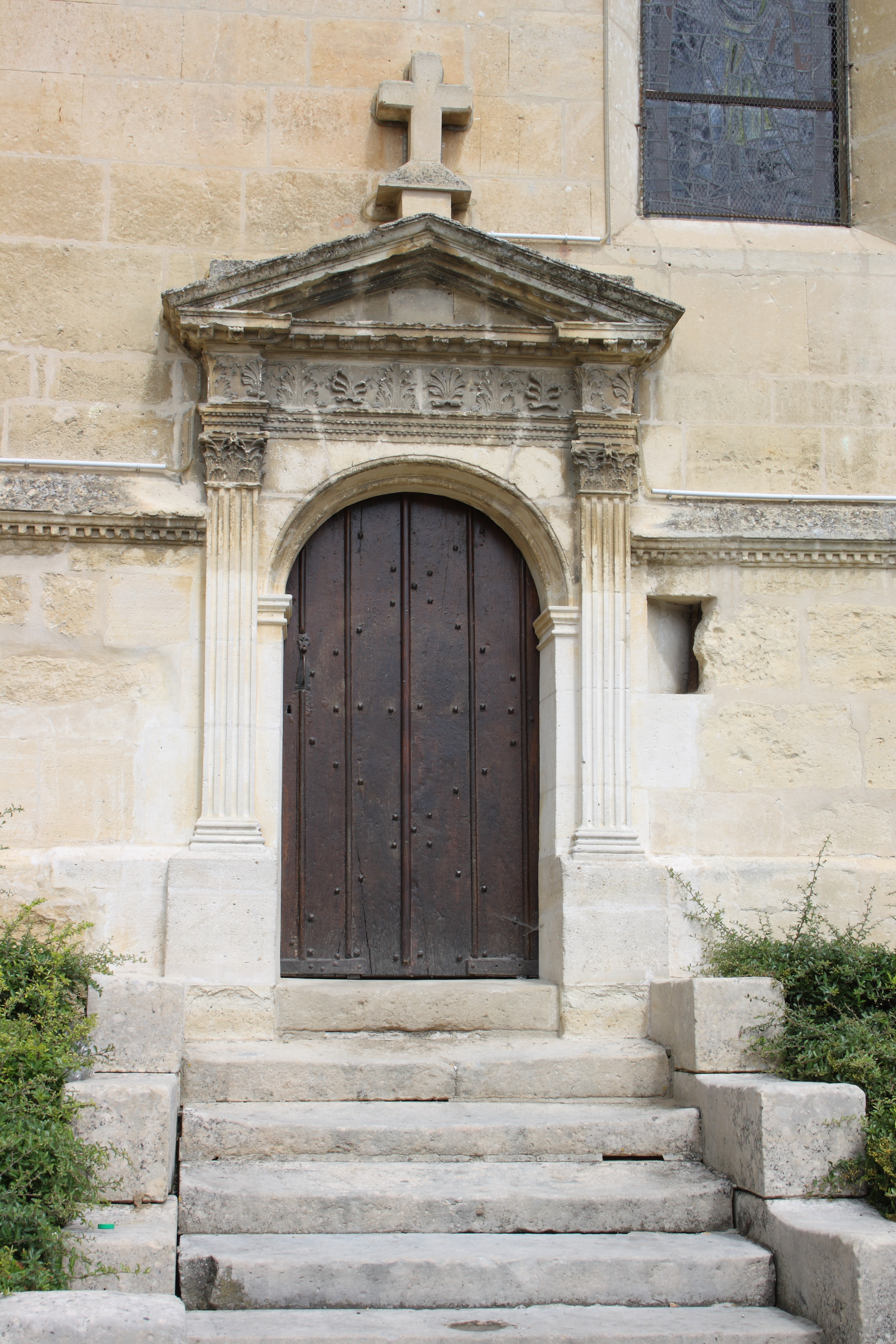 Katholische Kirche Saint-Denis in Jouy-le-Comte, einem Ortsteil von Parmain (Département Val-d’Oise) in der Region Île-de-France (Frankreich), Südportal